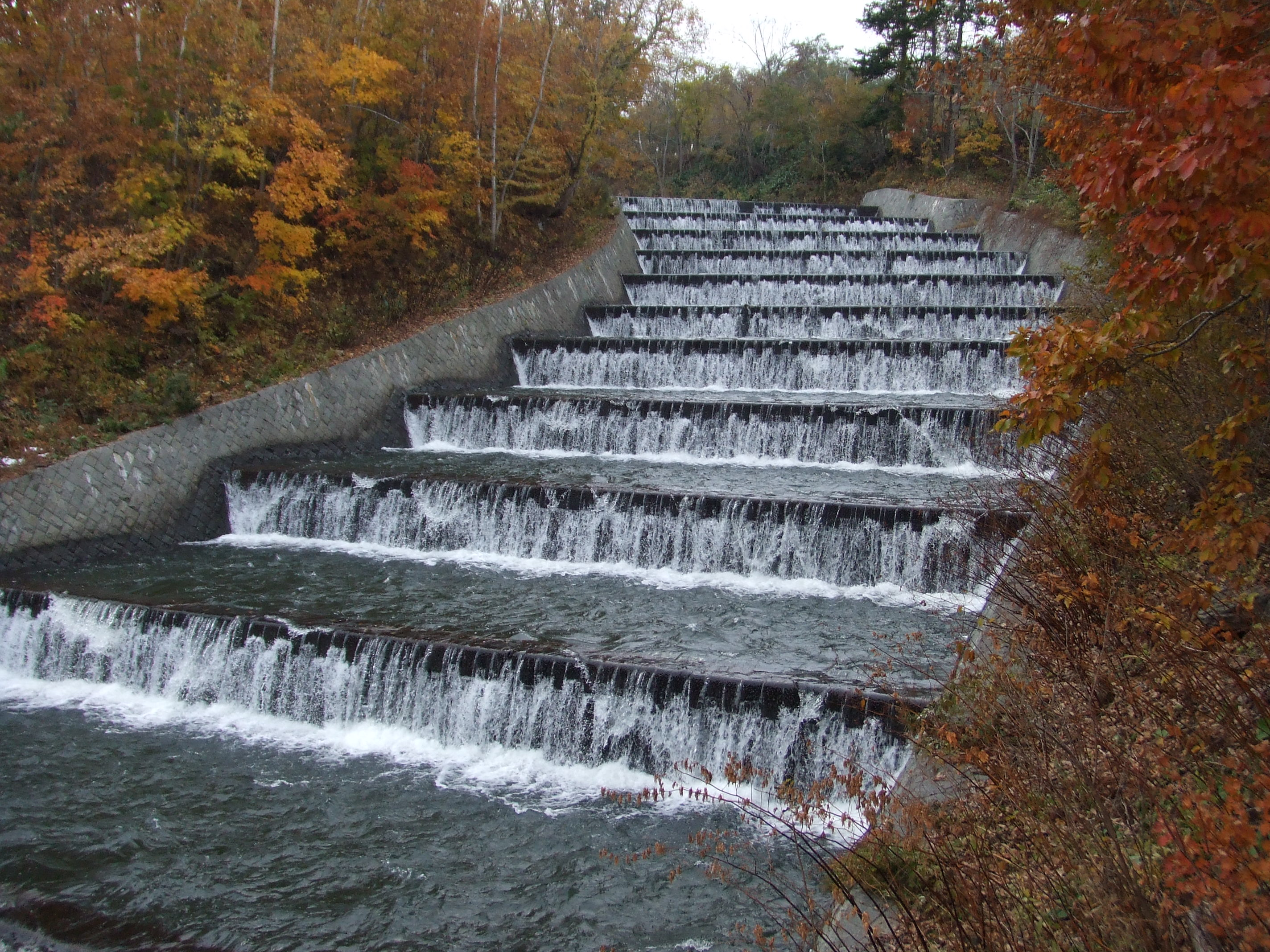 北海道小樽市奥沢ダムの階段式溢流路